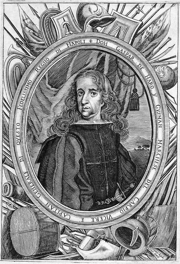 Gaspar de Haro y Guzmán, noble español del siglo XVII en un grabado del siglo XVII